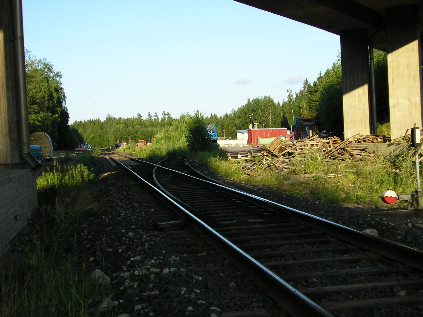 Former station of Röykkä [08-2004]